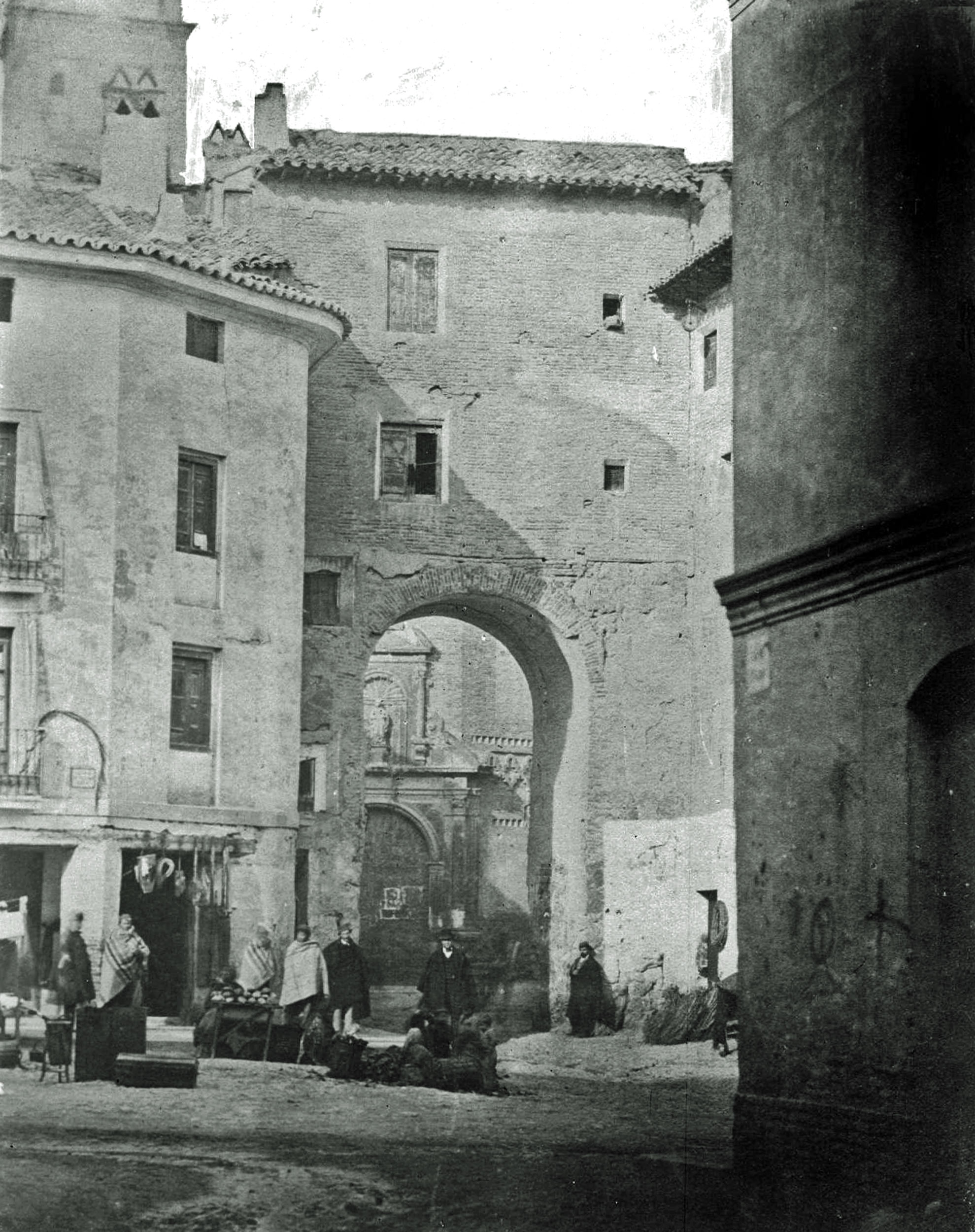 Aragonés: Puerta de Valencia (Zaragoza)